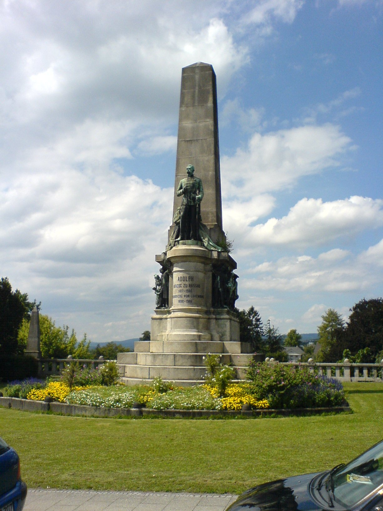 Das Bild zeigt das Landesdenkmal an der Biebricher Allee in Wiesbaden, unweit der Sektkellerei Henkell & Söhnlein. Es wurde zu Ehren des nassauischen Herzogs und späterem Großherzogs von Luxemburg Adolf errichtet. Es steht auf halbem Wege zwischen dem Nassauischen Stadtschloss in der Wiesbadener Innenstadt und dem Biebricher Schloss am Rhein. Urheber: Querido